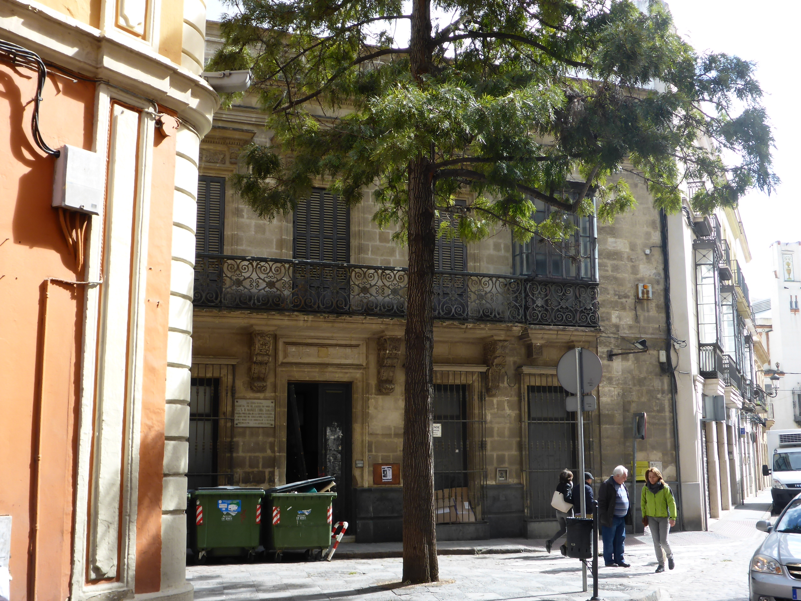 Casa natal de Manuel Lora Tamayo, Jerez de la Frontera (España)